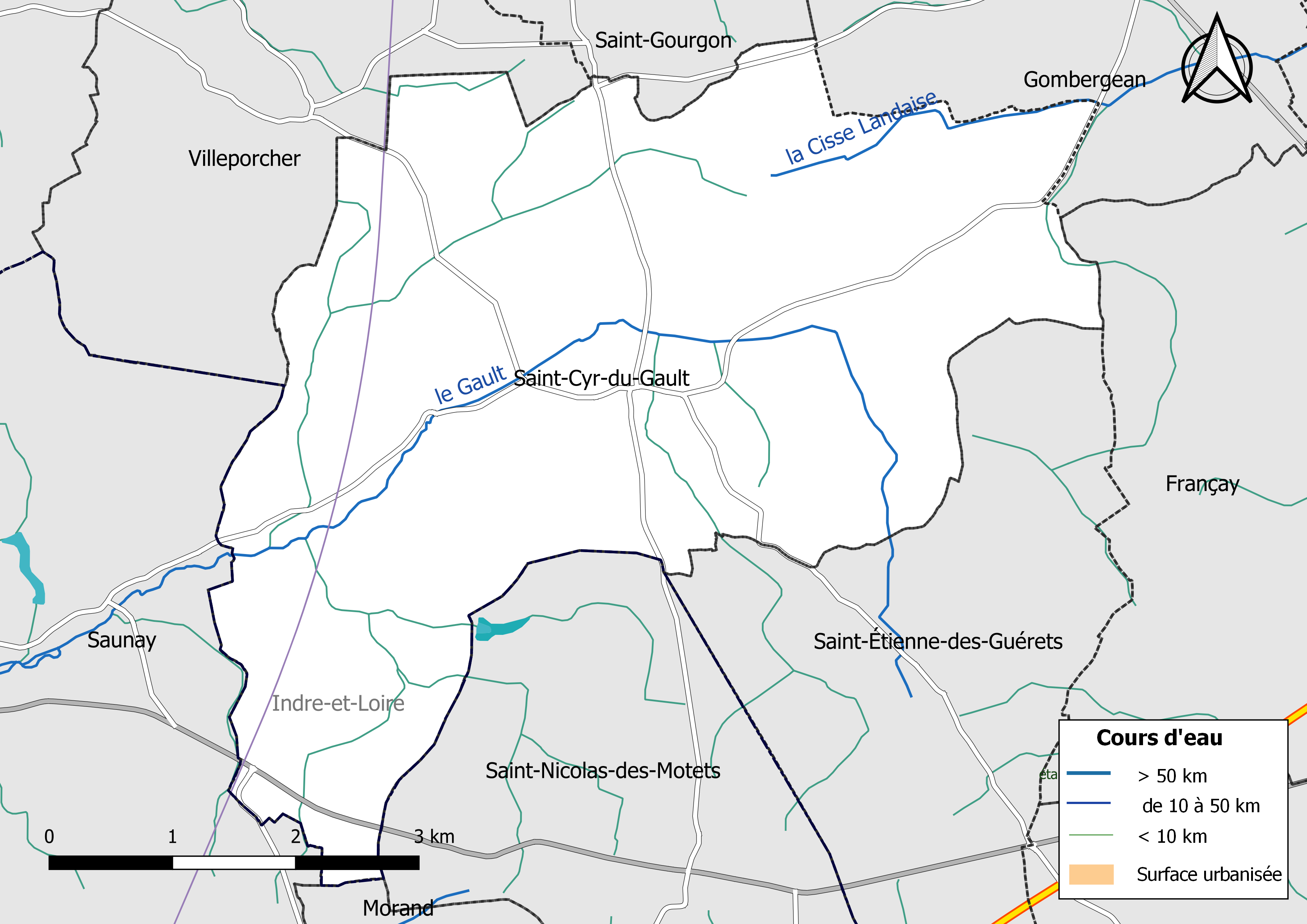 Carte du réseau hydrographique de la commune de Saint-Cyr-du-Gault (Loir-et-Cher, France).